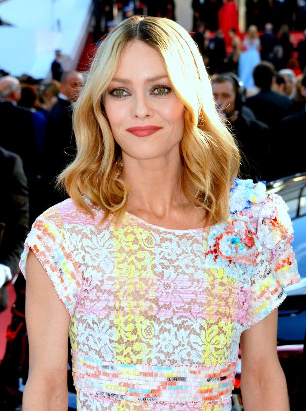 Vanessa Paradis au festival de Cannes